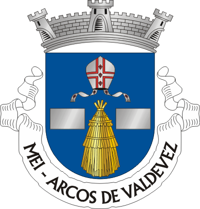 Wapen van Mei, Portugal. Mei is een dorp (freguesia) in de gemeente Arcos de Valdevez, in de Portugese district Viana do Castelo.